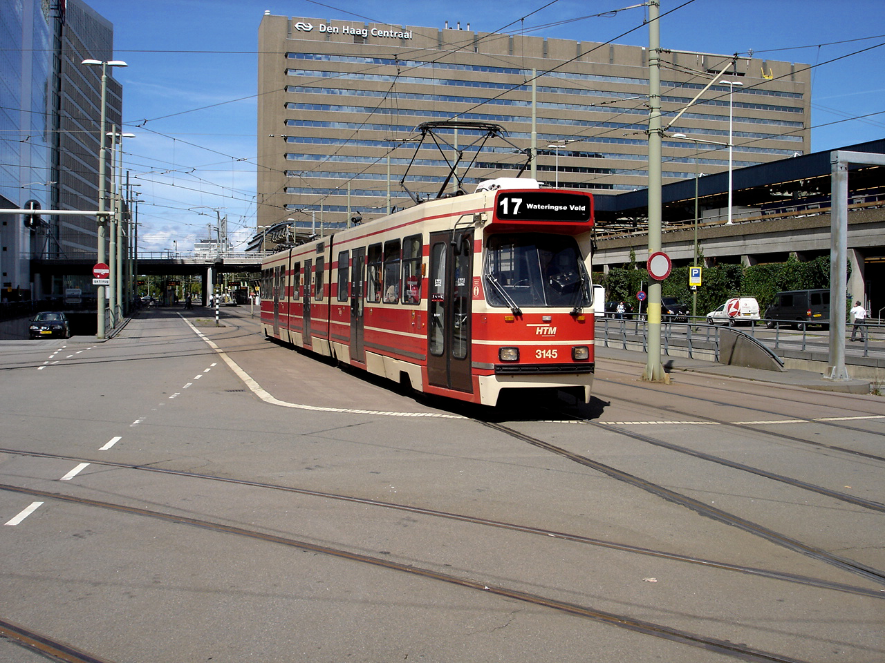 Rijnstraat Den Haag, GTL tram 17